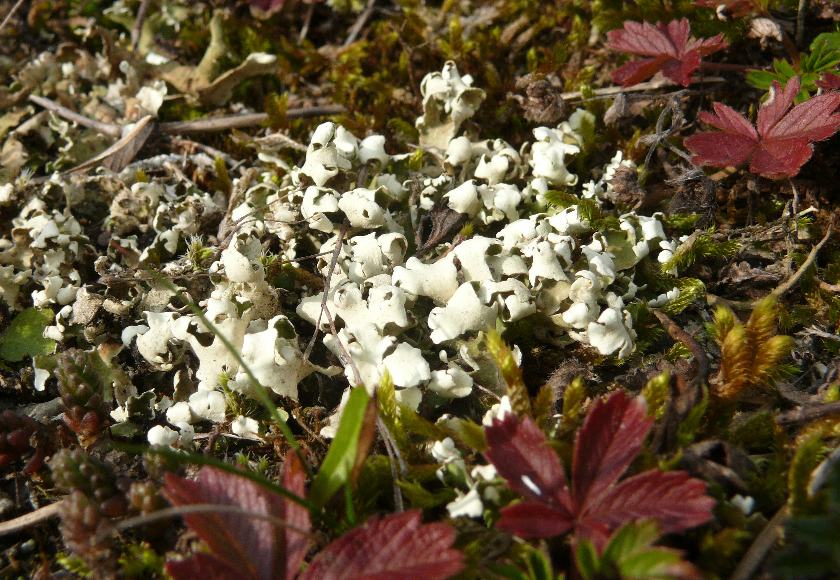 Cladonia convoluta, Bauland, Germany